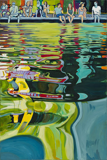 Osgyányi Sára: Érzők és érzéstelenek